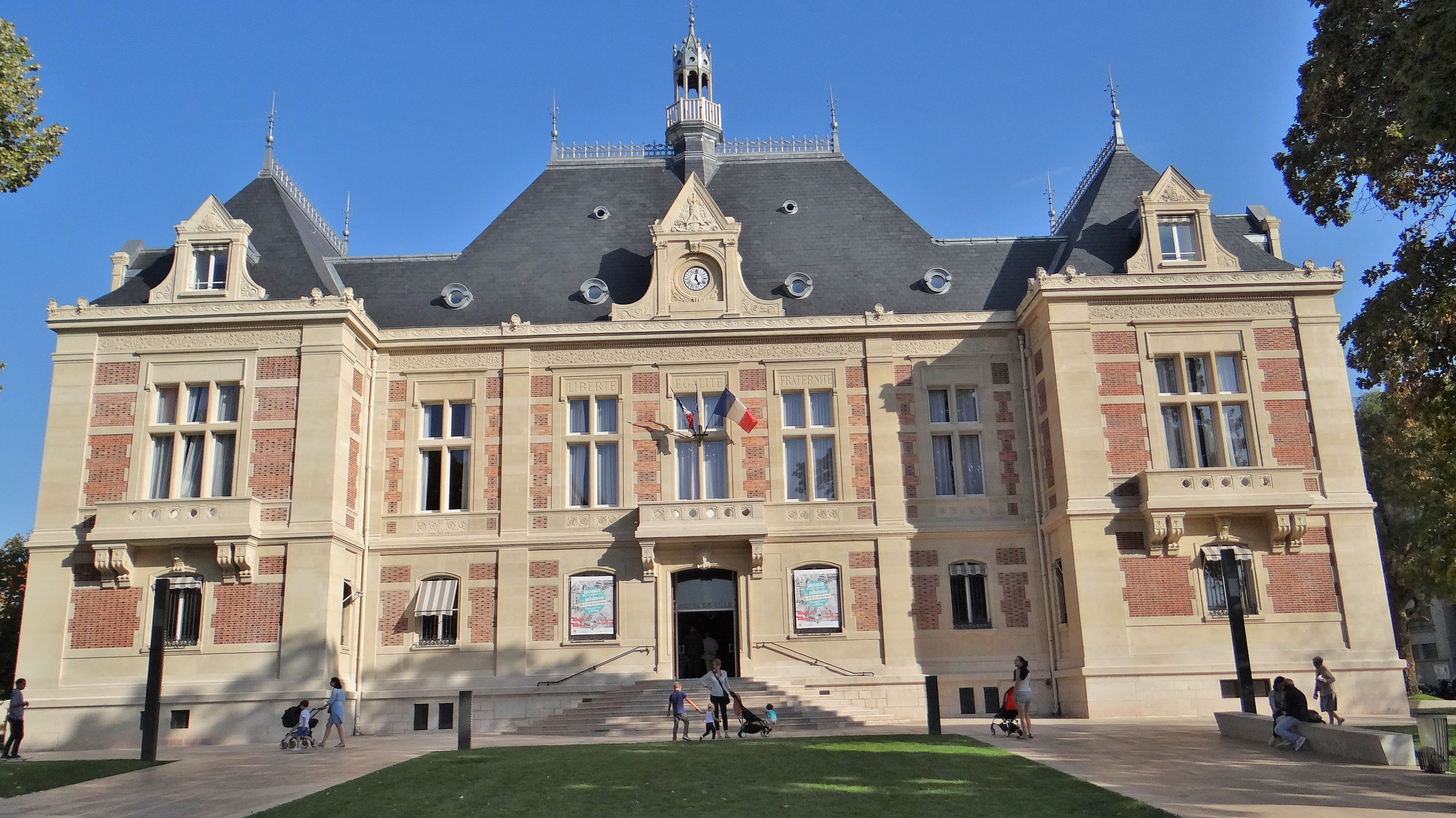 Hôtel de Ville (restauré en 2018), Montrouge, vue du Beffroi